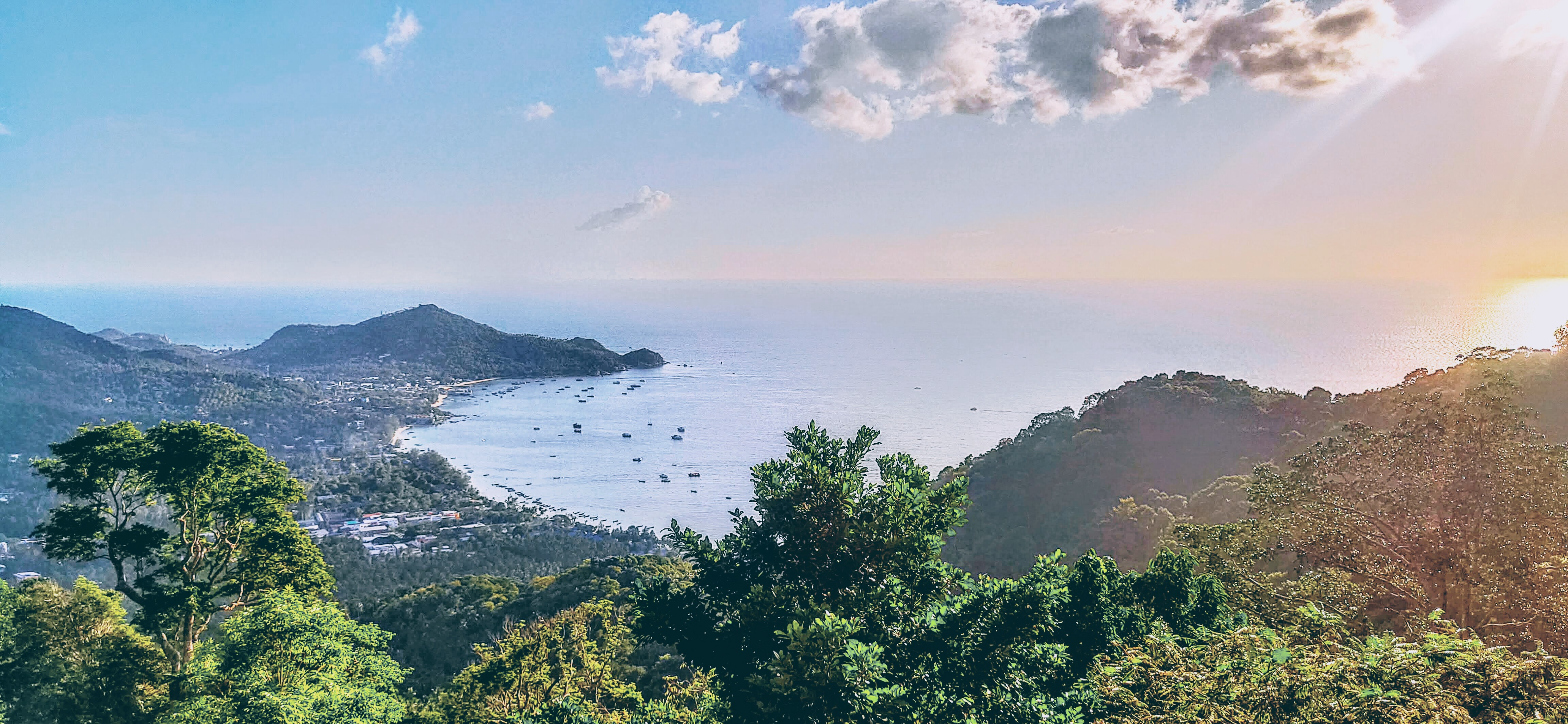 เกาะเต่าจุดชมวิว mango bay